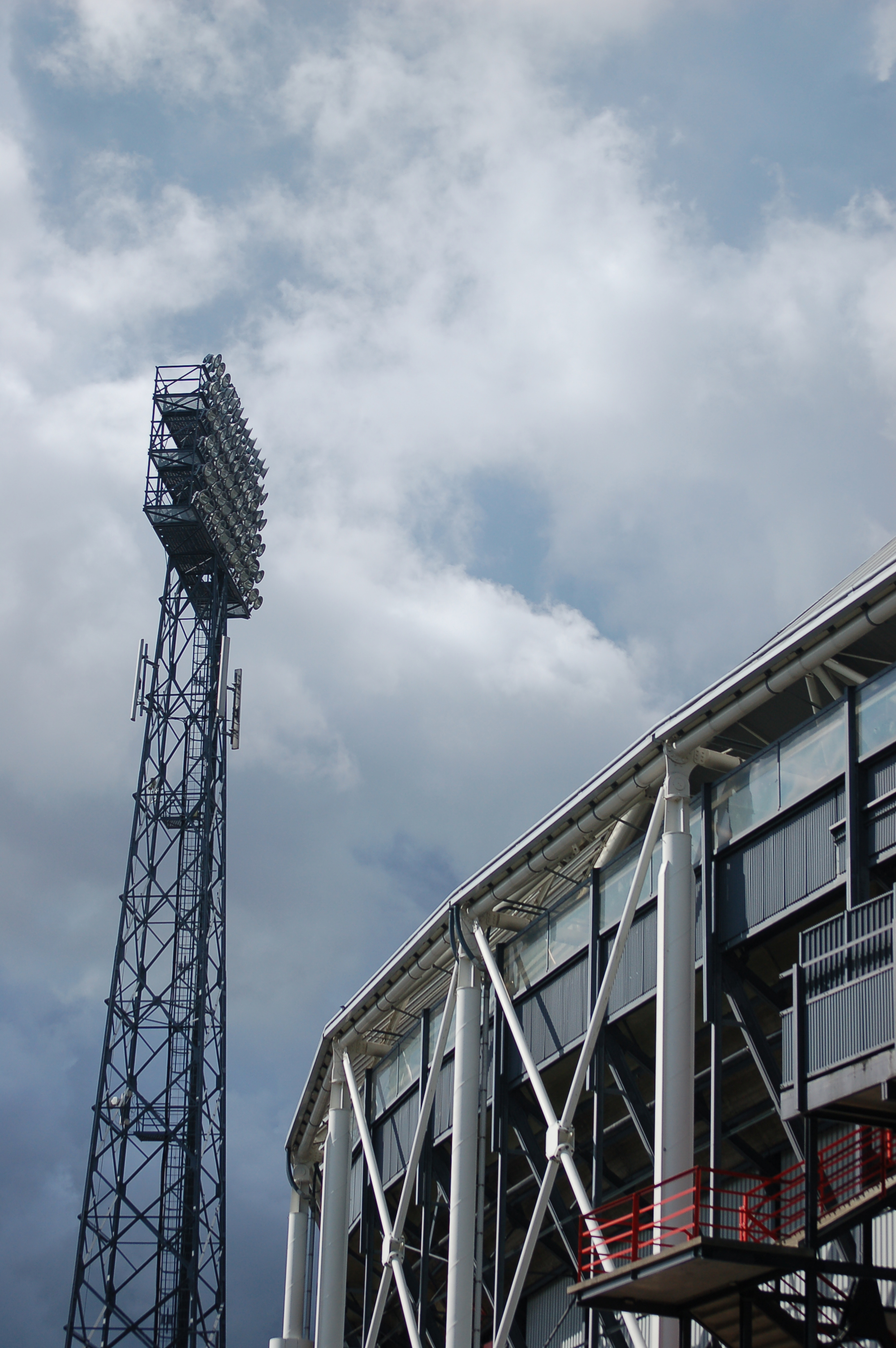 Feyenoord stadion 'De Kuip'.